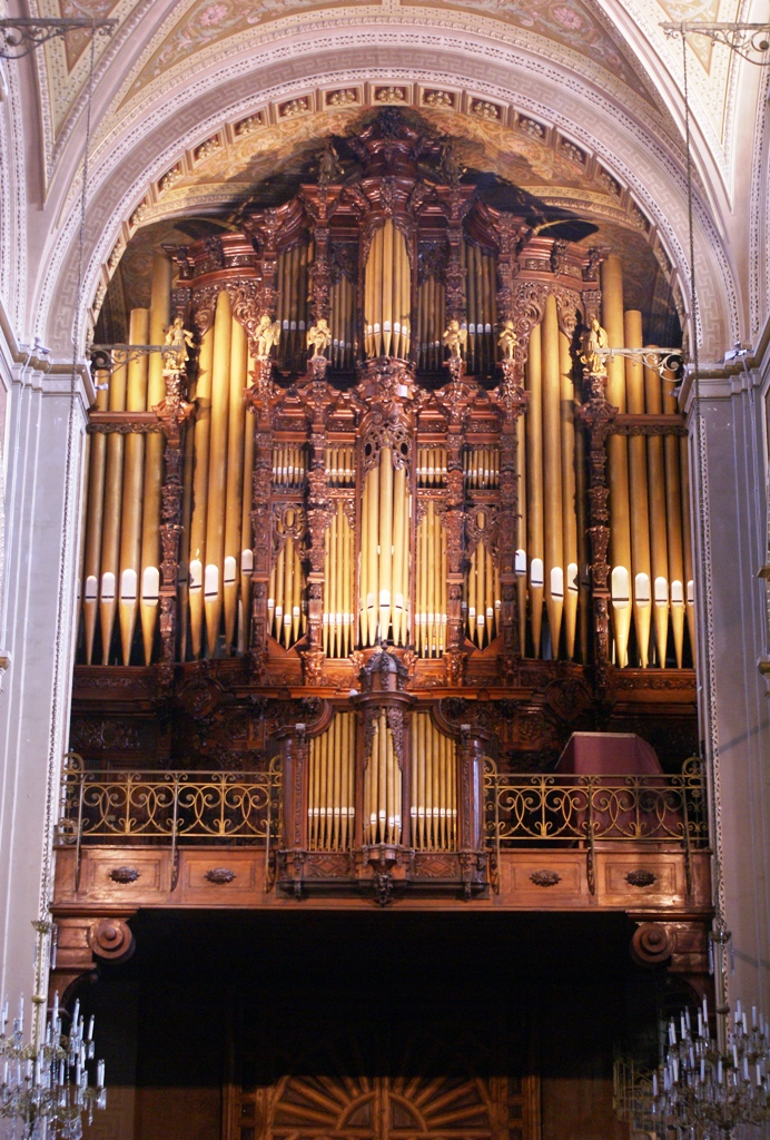 Órgano tubular ubicado en la Catedral de Morelia, Michoacán, México. Fabricado en Alemania en 1905, consta de 4600 flautas.